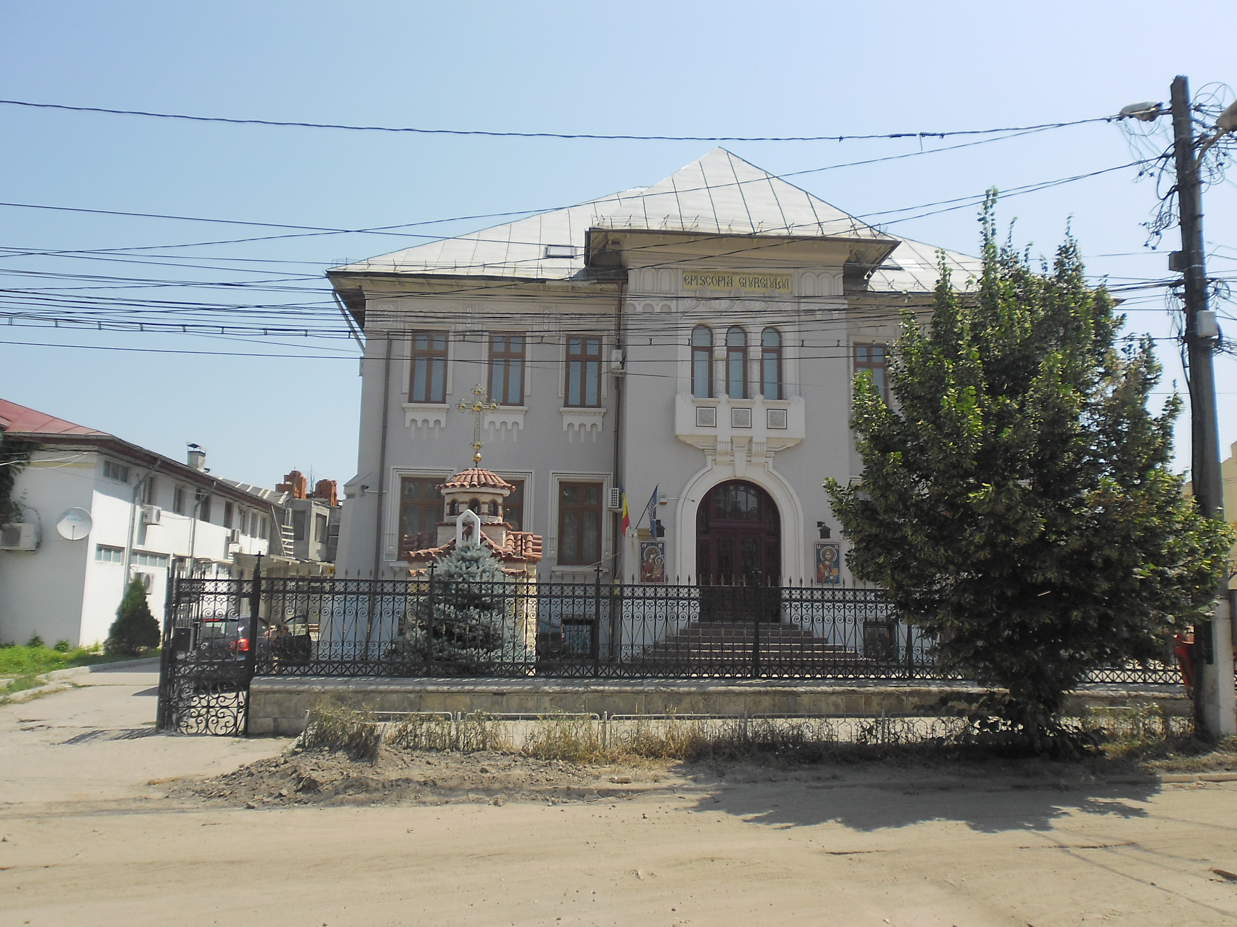 Administrația Financiară, azi Episcopia Giurgiului